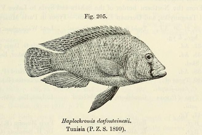 Astatotilapia desfontainii from Tunisia